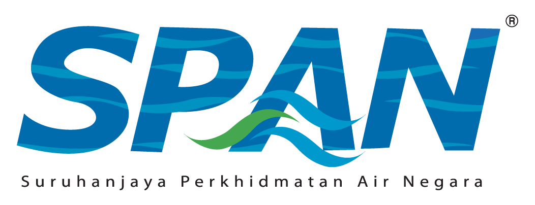 LogoSPAN